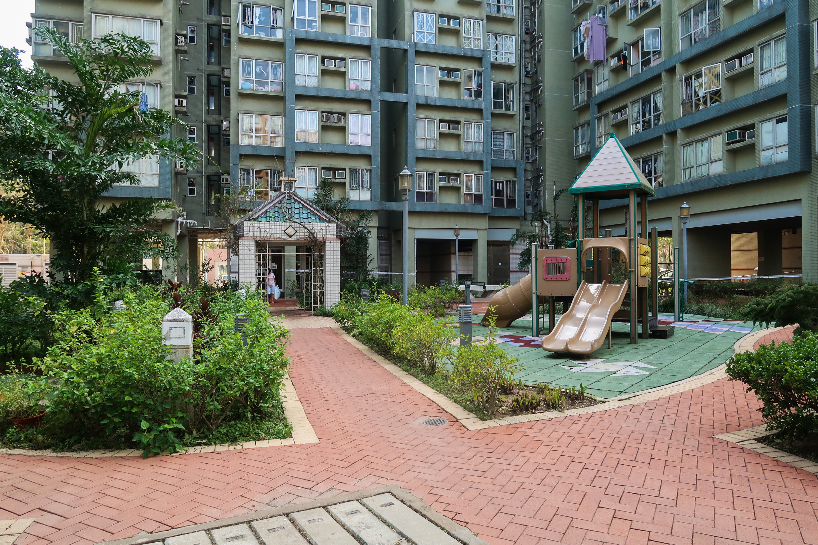 Lakeside Garden Children Play Area